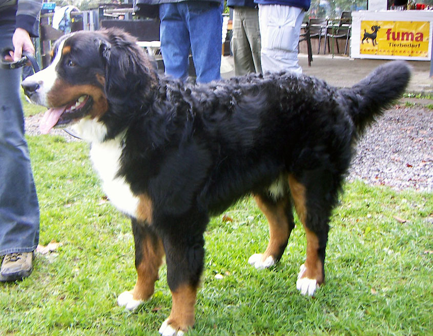 Berner Sennhund fotografiert am 10.9.2005 von steffen heinz (caronna)